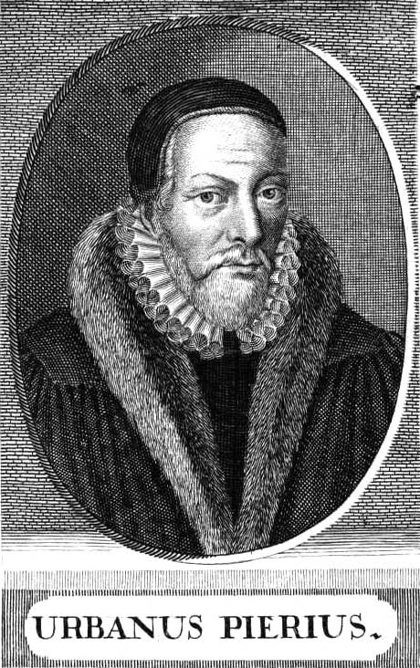 Kupferstich - Urban Pierius (1546-1516) deutscher evangelischer Prediger